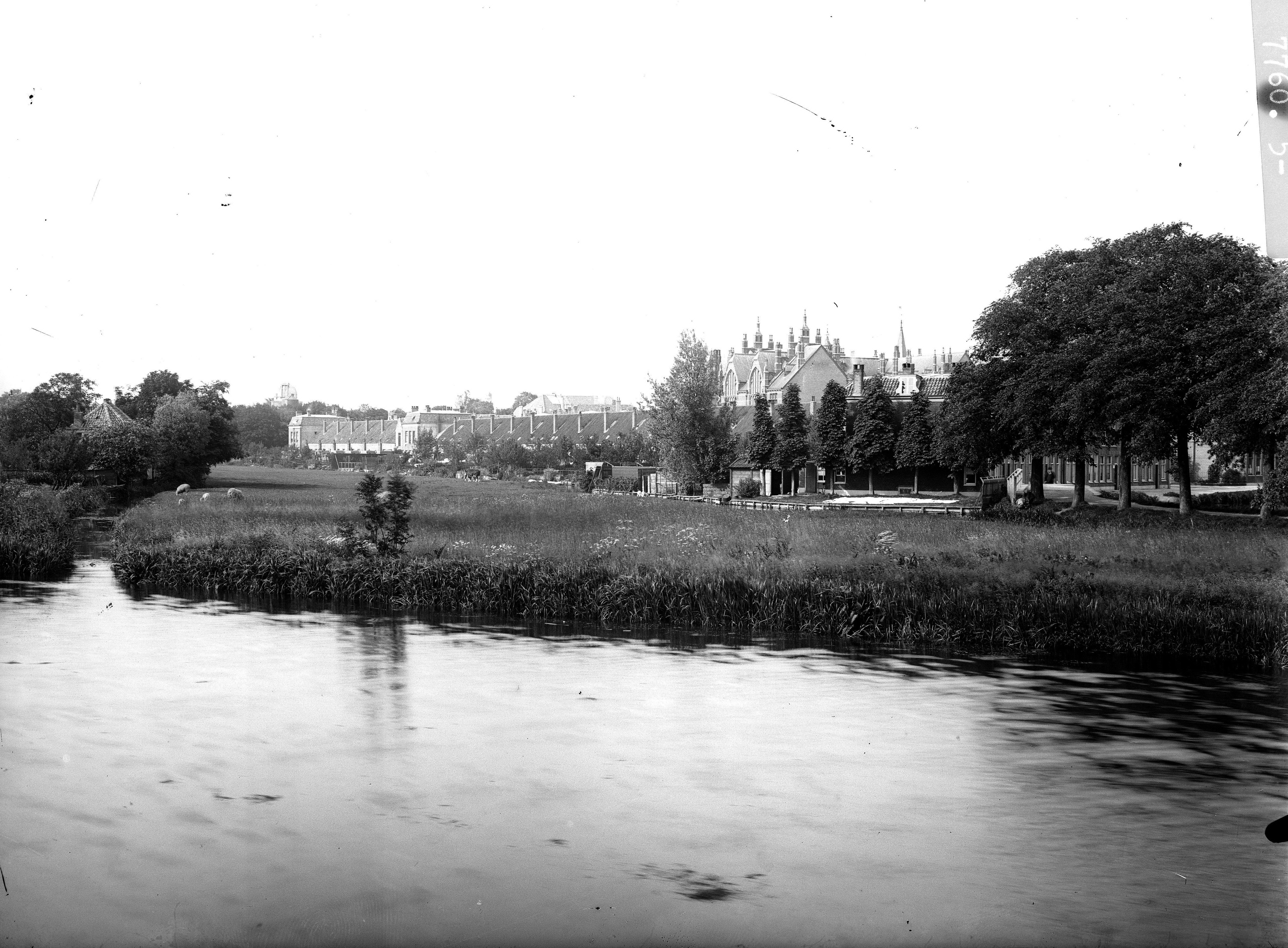 Gezicht op de weilanden achter de Gerrit Doustraat waar later de Witte Rozenstraat werd aangelegd. Rechts de Jan van Goyenkade. Op de voorgrond de Trekvliet. Gezien vanaf de Rijn en Schiekade naar het noorden. Sterrenwacht op de achtergrond. Ca. 1896.